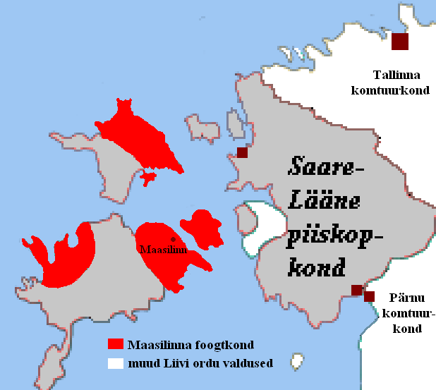 Maasilinna foogtkonna kaart